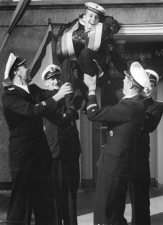 Ruderer, DDR, Europameister im Vierer Zentralbild Pinske 3.9.1957 Europameister Vorwärts in Berlin Die Ruderer der DDR, die an den Europameisterschaften in Duisburg teilnahmen, sind wieder zurückgekehrt. Am Dienstag, dem 3.9.1957, fand auf dem Bootsgelände des ASK Vorwärts Berlin für die Europameister im Vierer mit Steuermann eine Ehrung statt. UBz: Die Europameister vor ihrem Bootshaus in Berlin-Grünau. Übermütig heben die Titelträger im Vierer mit Steuermann ihren Steuermann hoch. Wir erkennen von links nach rechts: Wundratsch, Dathe, Steuermann Dommick, Müller und Meyer (halb verdeckt).